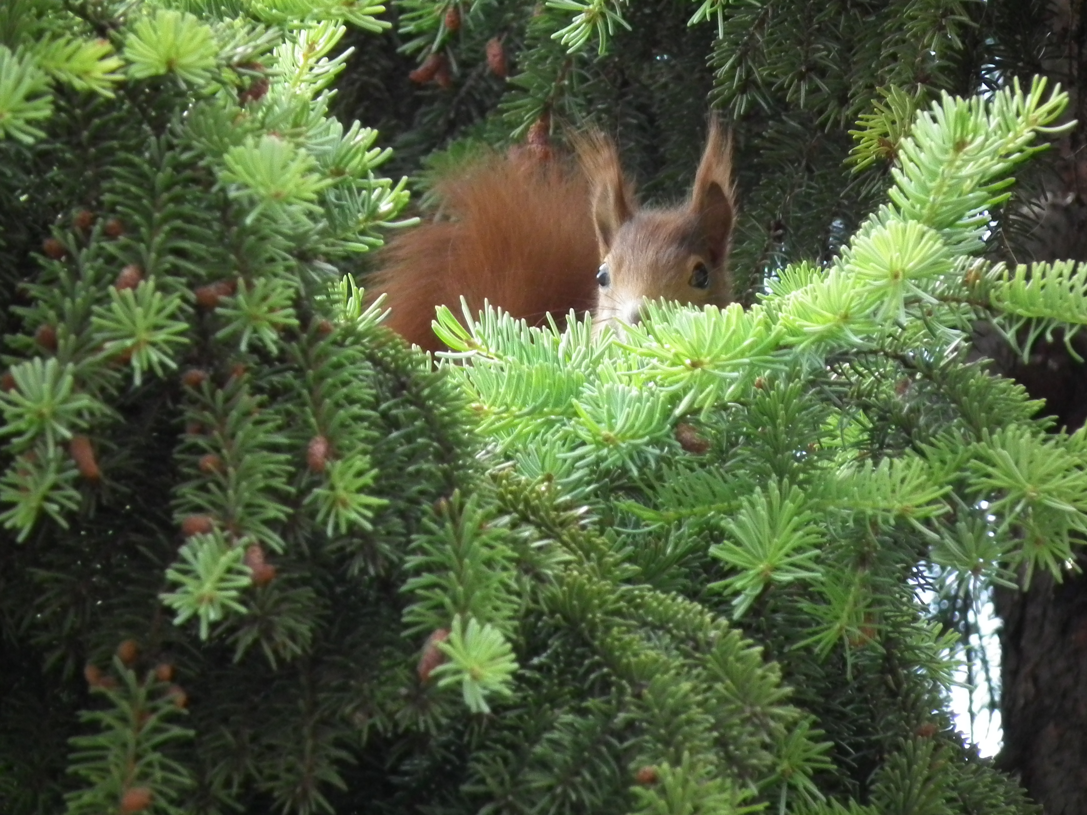 Europäisches Eichhörnchen (Sciurus vulgaris), fotografiert in Plankstadt (Baden-Württemberg, Deutschland)